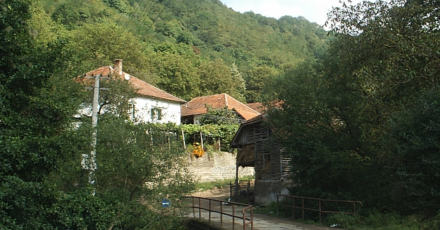 Доње Романовце